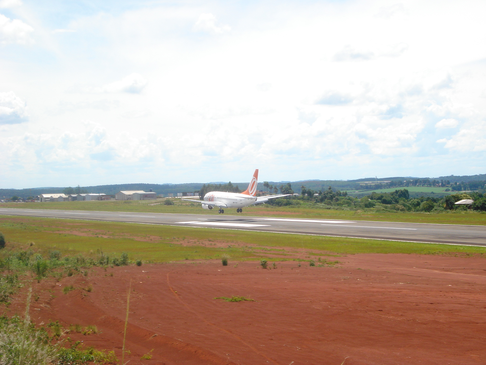 Gol Aterisando no Aereoporto de Chapecó